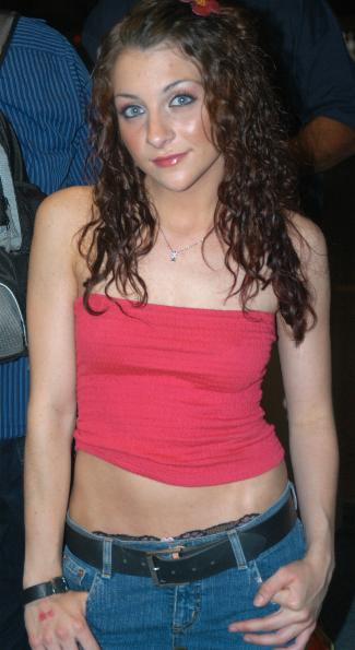 Jordan Fleiss